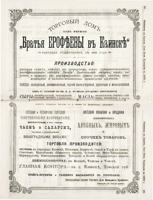 Newsletter advertise trade house of Erofeev Brothers 1898 (Russian letters). Фото с газеты.